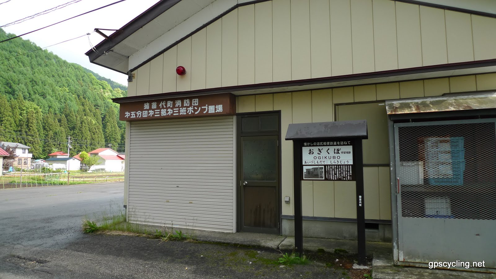 沼尻軽便鉄道荻窪駅跡